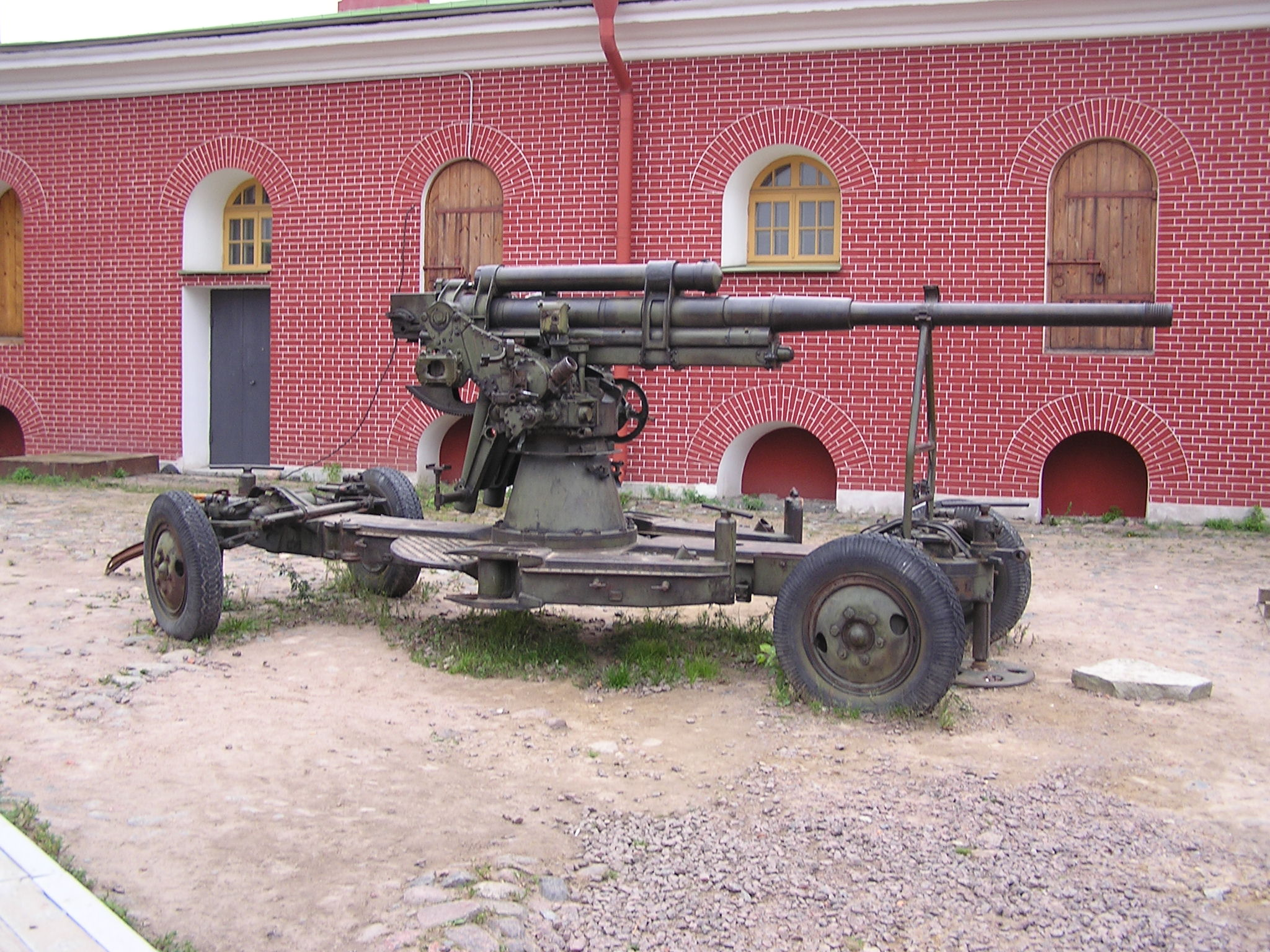 Санкт-Петербург. Петропавловская крепость. Пушка